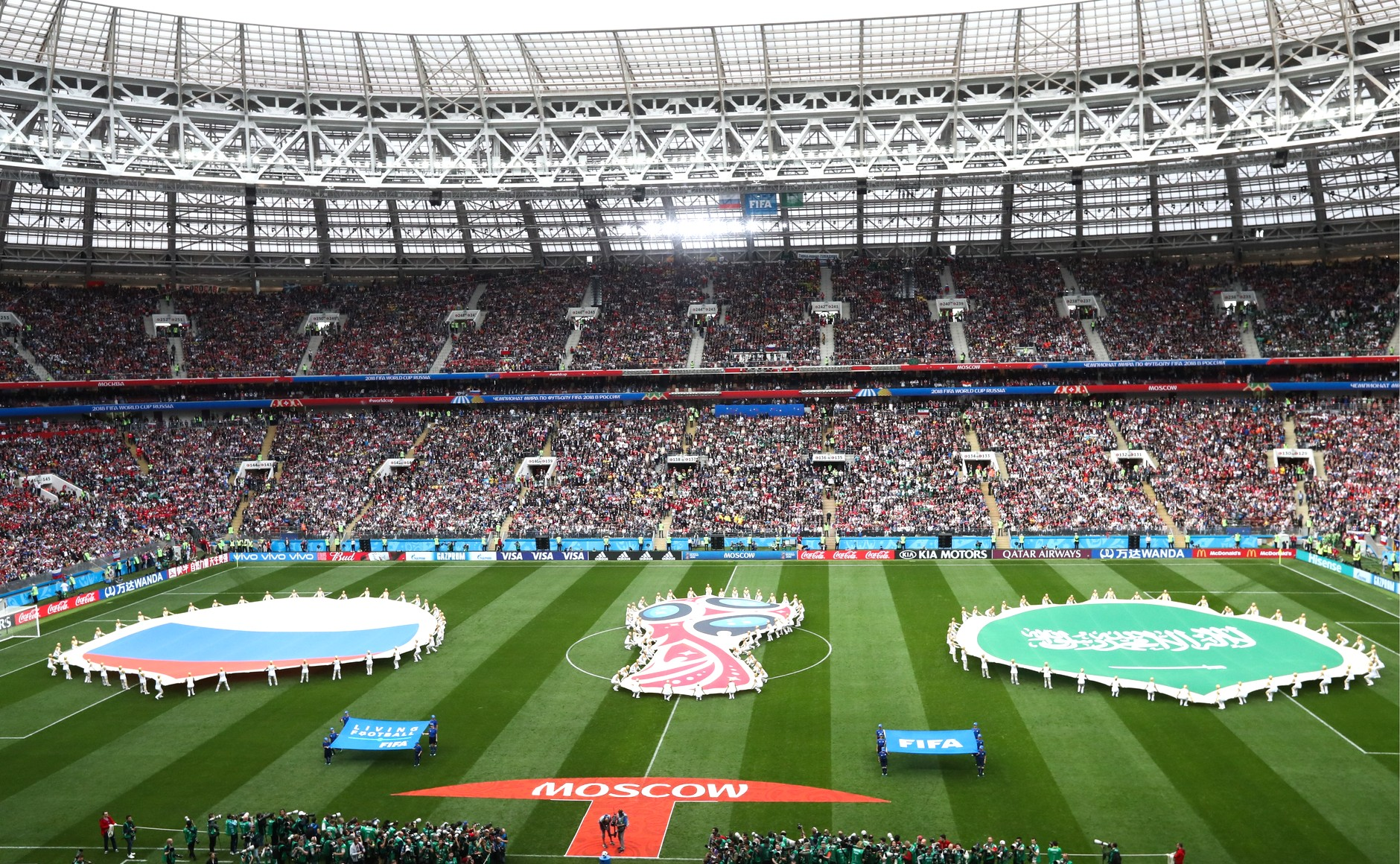 Церемония открытия чемпионата мира по футболу 2018 года